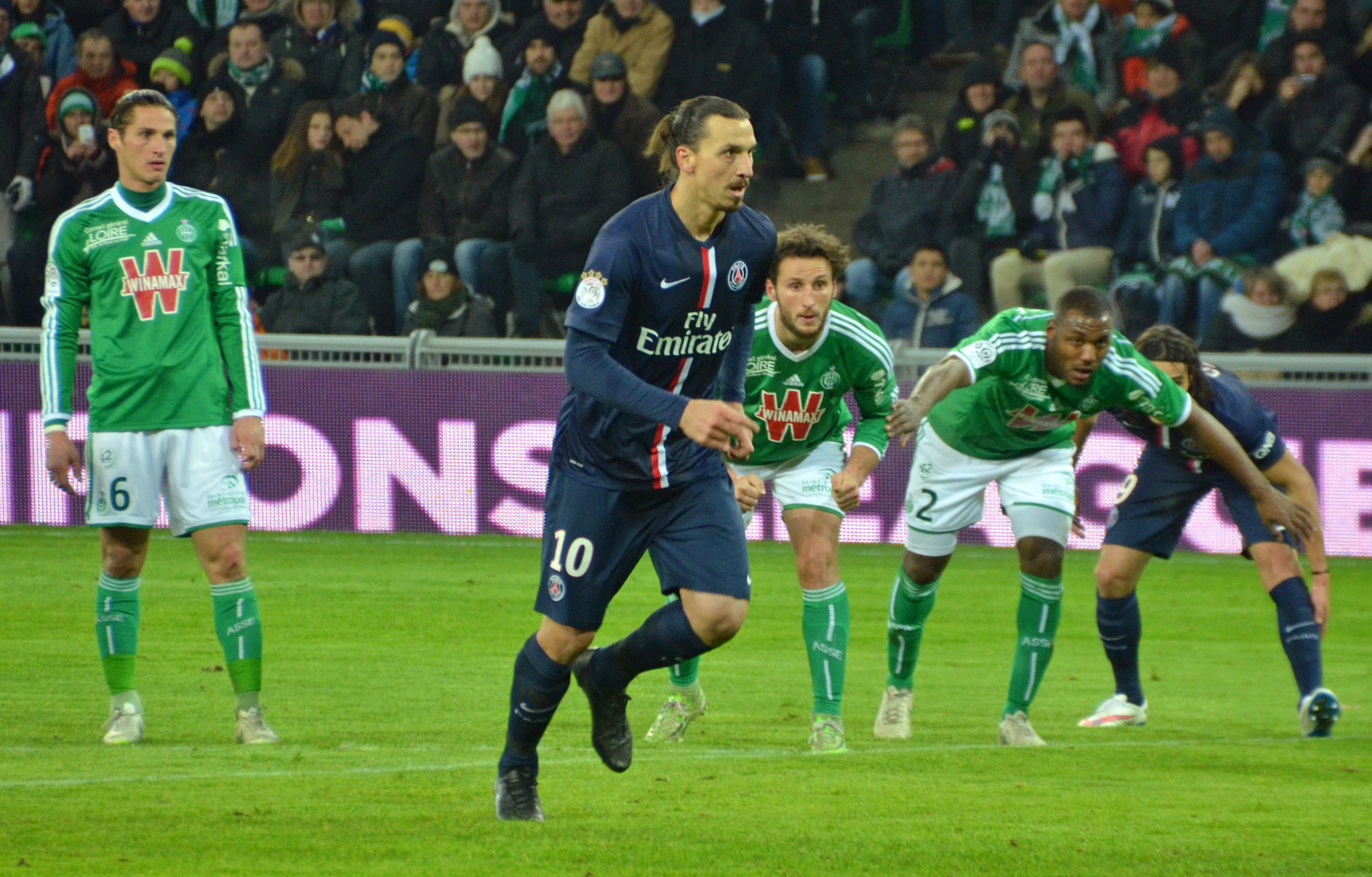 Zlatan Ibrahimović lors du pénalty victorieux du Paris Saint Germain à Saint Etienne le 25 janvier 2015 (1-0)